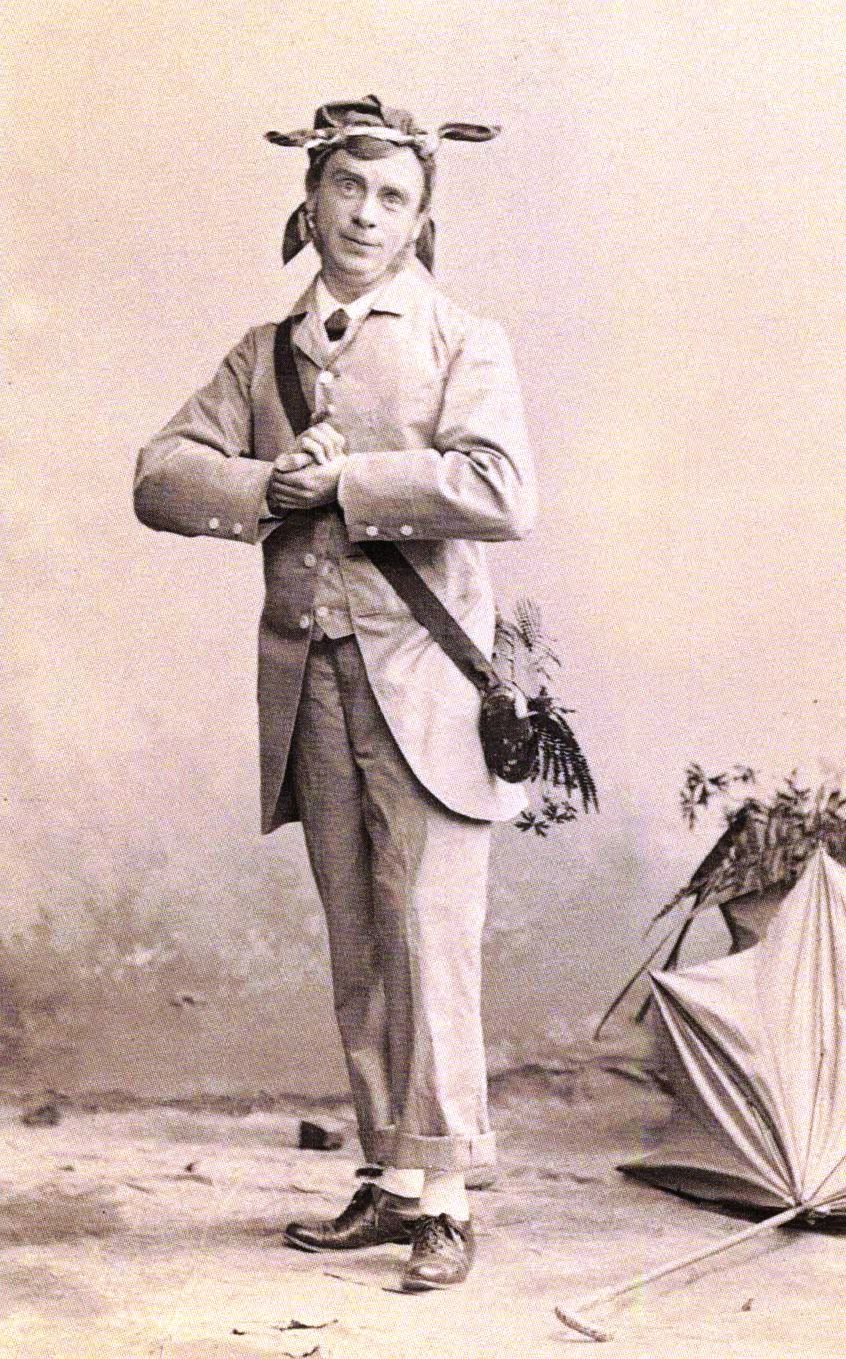 Carl Friese in „Waldmeister“ von Johann Strauss (Sohn) am Dresdner Residenz-Theater (1896)